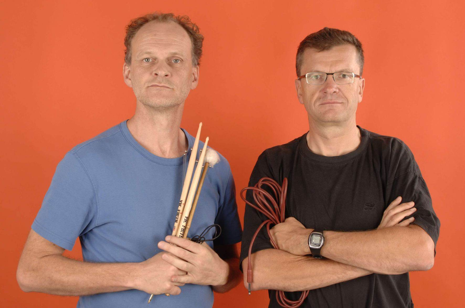 Foto des Klammer_und_Gruendler_Duo